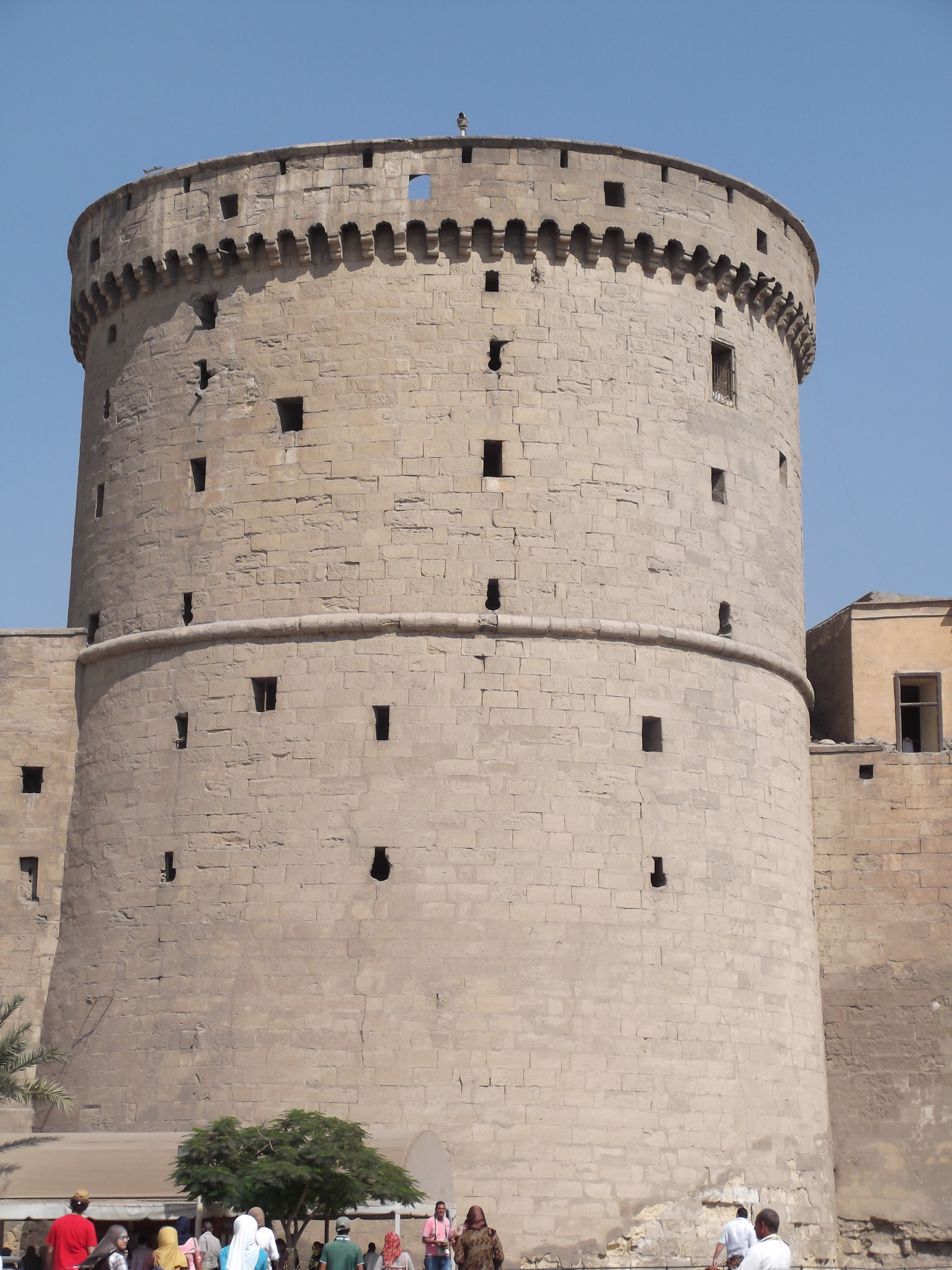 قلعة صلاح الدين الأيوبي بالقاهرة.